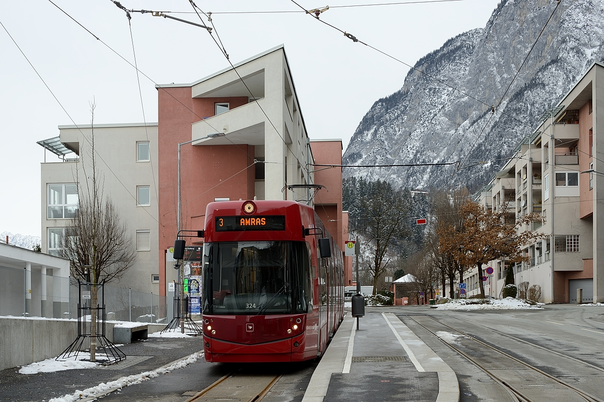 Flexity 324 in Innsbruck, Endhaltestelle Peerhofsiedlung